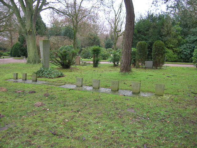 Gedenkstätte für die Opfer der nationalsozialistischen Gewaltherrschaft mit dem Obelisken der Zukunft von Georg Grygo auf dem Bremerhavener Friedhof in Wulsdorf (1958).